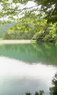 伊奈ヶ湖風景